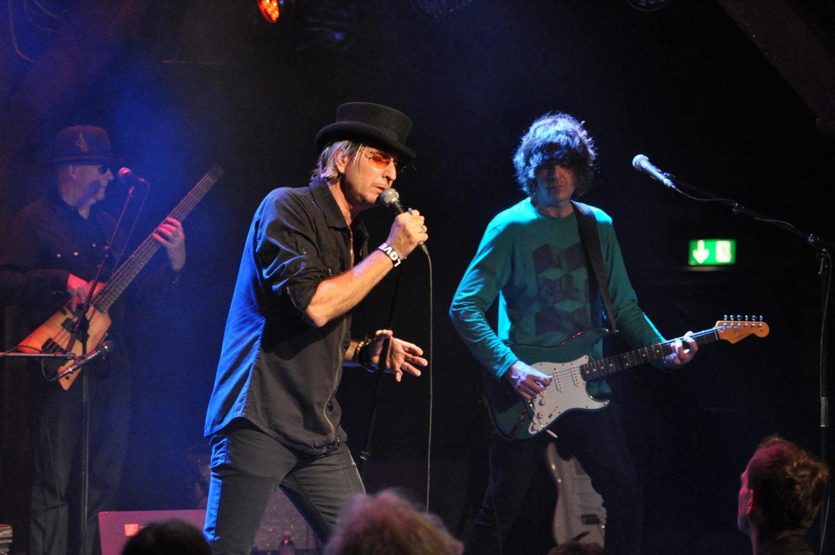 En concert à Hambourg (Allemagne) le 22 octobre 2012